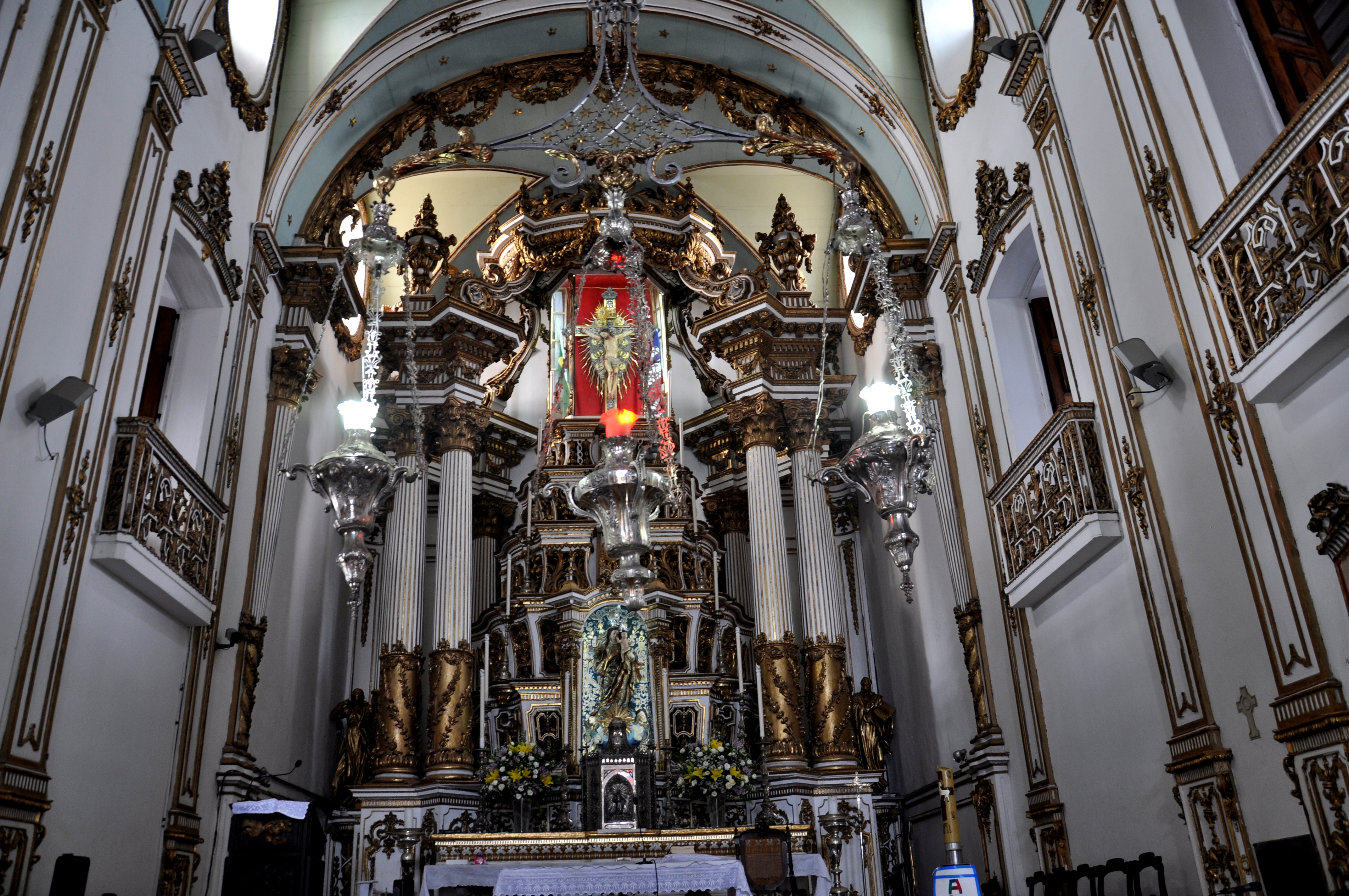 Igreja do Bonfim 9 Foto Tereza Torres